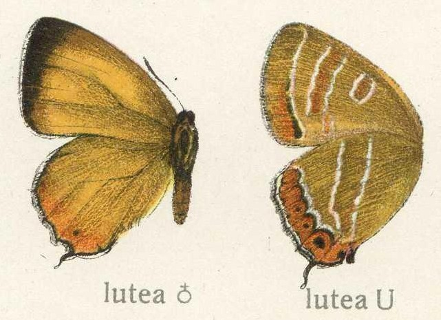 Prosotas lutea, Lycaenidae